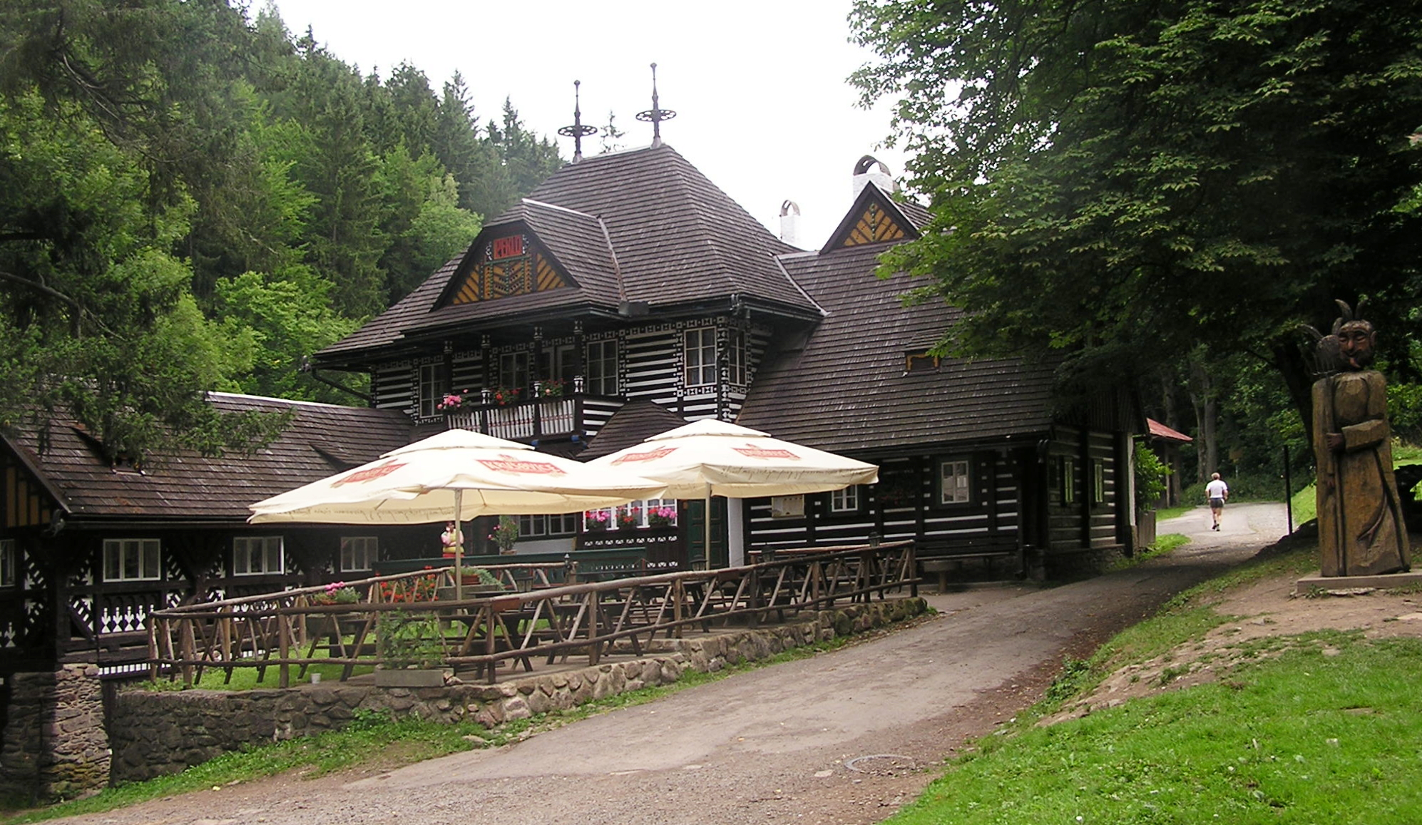 Bartoňova útulna v Pekle (architekt Dušan Jurkovič) - nyní restaurace a ubytovna (Nové Město nad Metují)